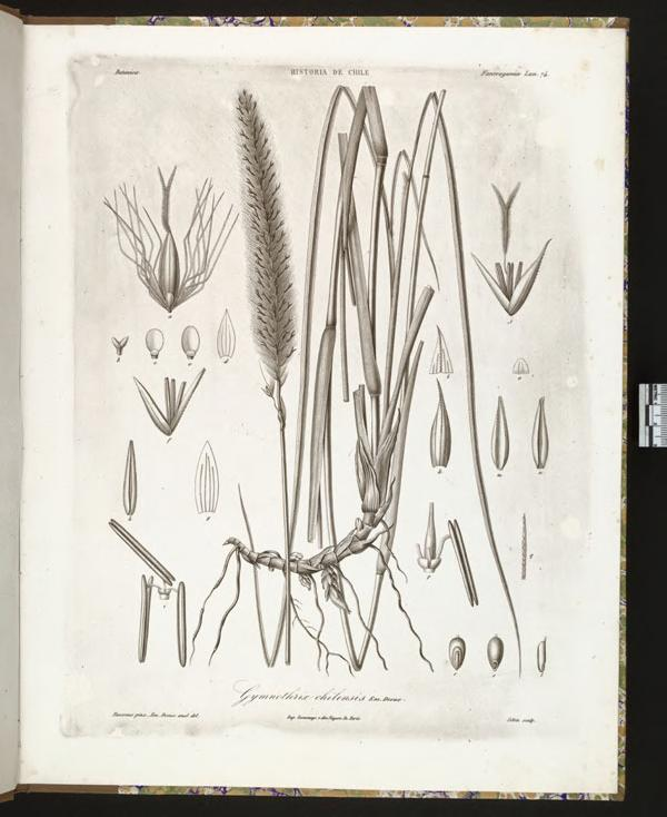 Gramineae Chilenses /auctore Em. Desvaux.